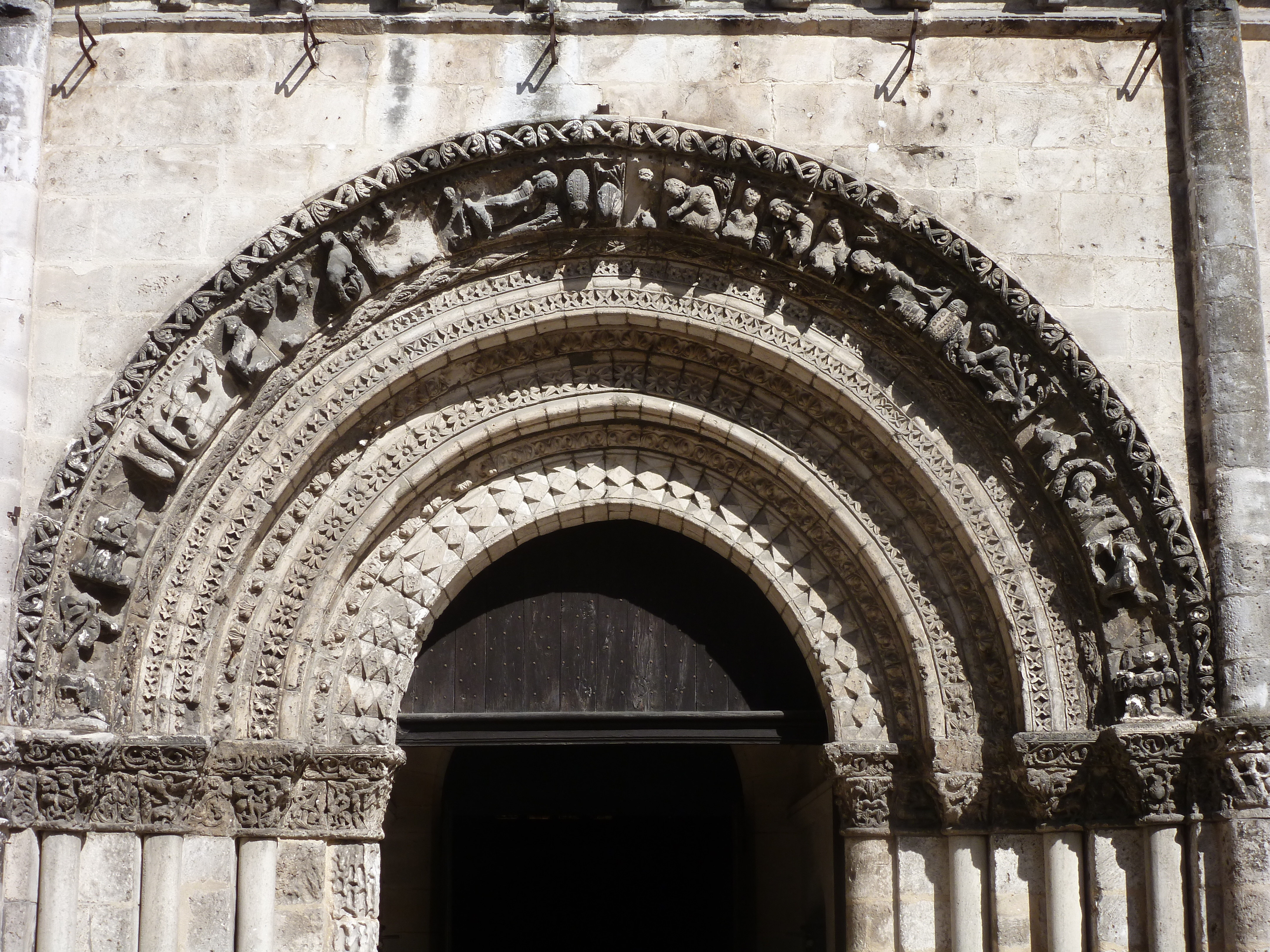 Église Saint-Léger de Cognac (Charente, Poitou-Charentes, France).